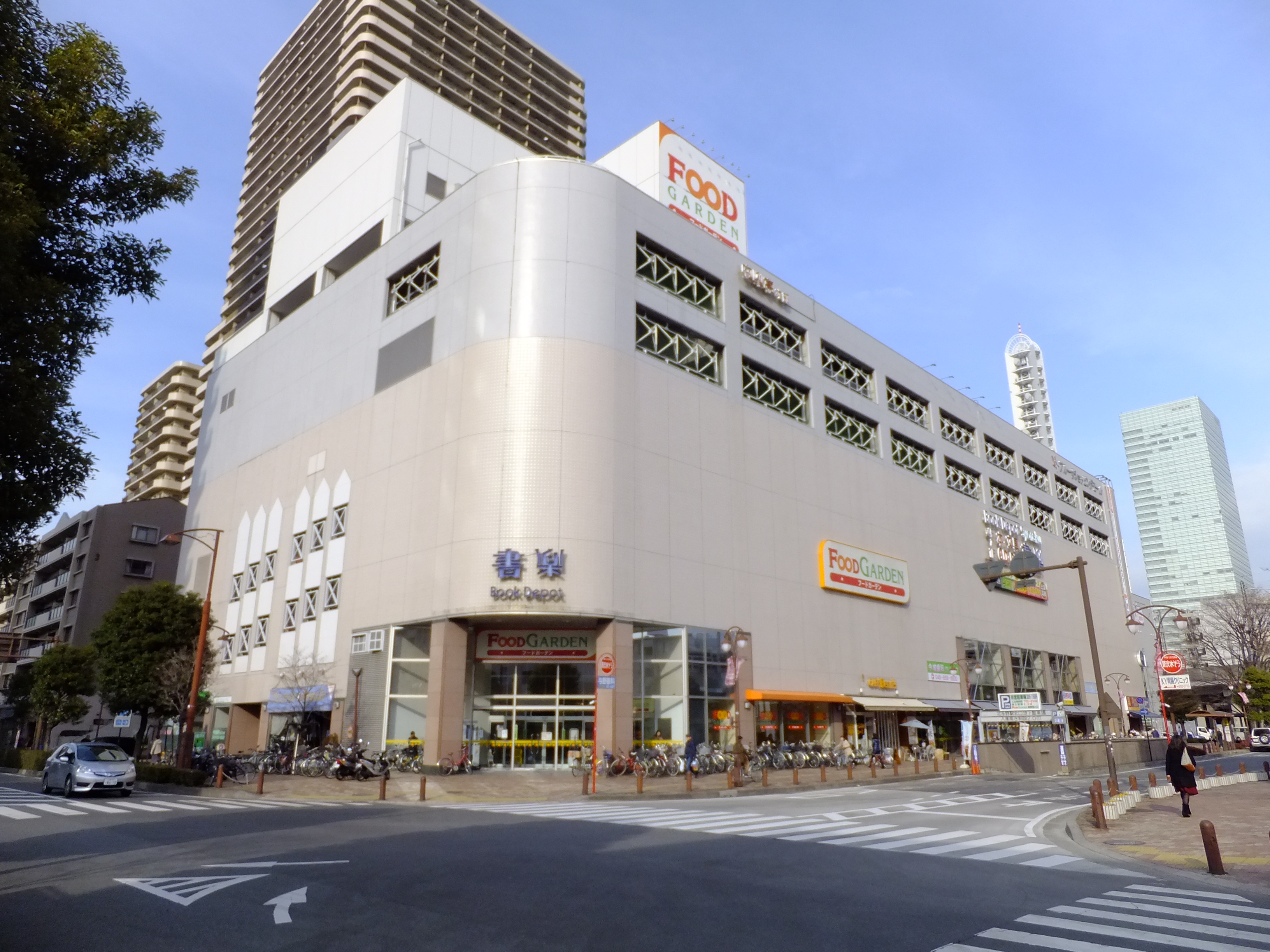 アルーサショッピングモール（さいたま市中央区）。大型書店・書楽、安楽亭本社等が入る。